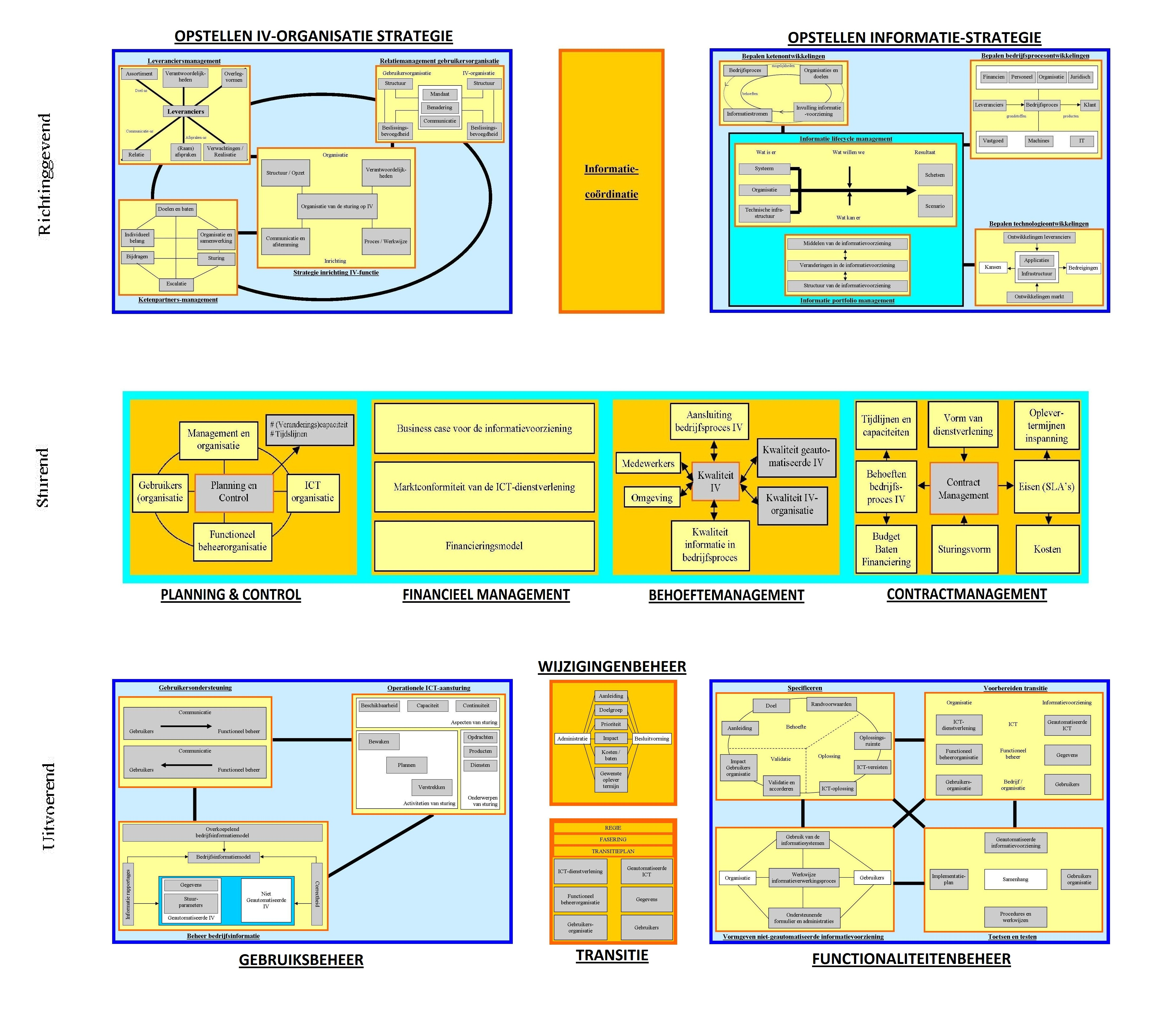 Het BiSL model heb ik uitgewerkt met alle onderwerpen die zich binnen alle clusters begeven.